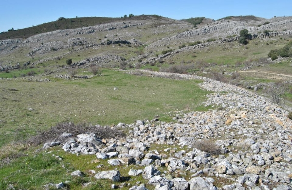 Muralla oeste del yacimiento de la II Edad del Hierro